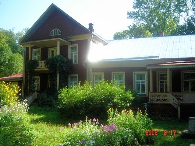 Усадьба Жуковских (усадьба-музей Н.Е.Жуковского): Орехово, Собинский район, Владимирская область